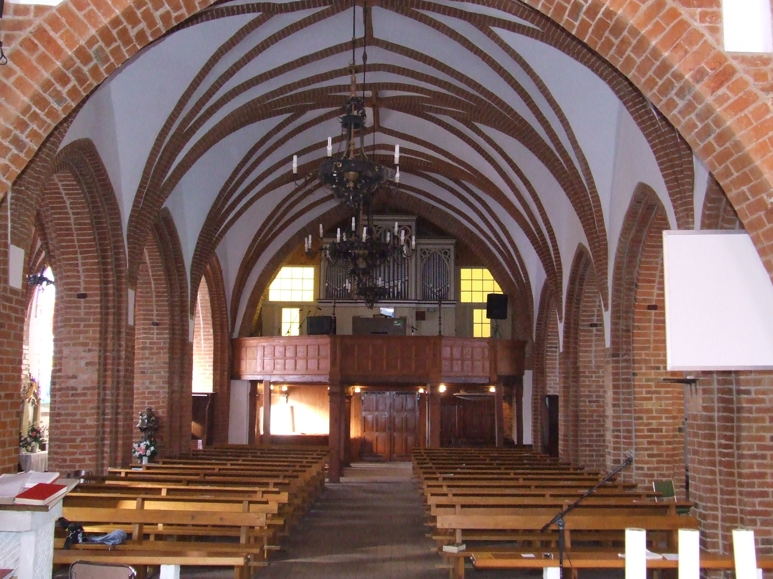 Karlino, wnętrze kościoła, widok nawy głównej; autor zdjęcia Marzena Czarnas; 12.01. 2006 r.